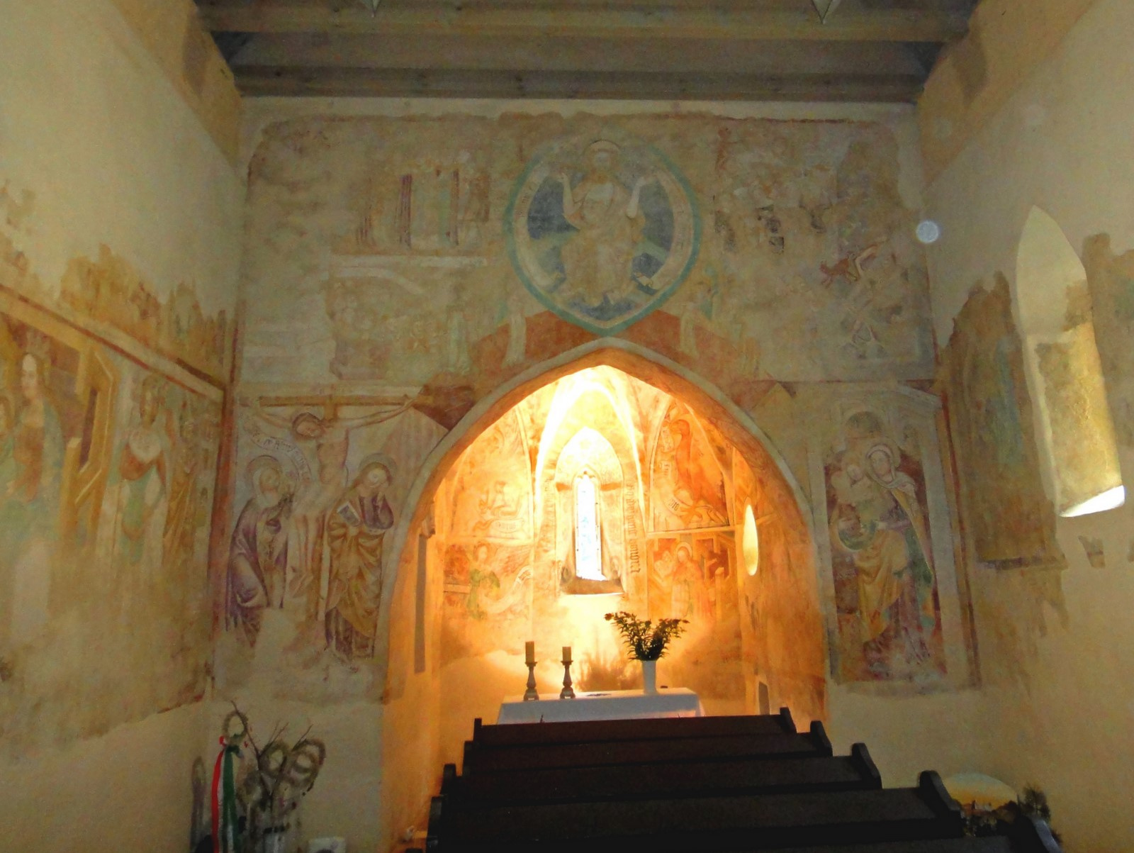 Szentháromság és Szent István király római katolikus templom (Velemér, Paprét) This is a photo of a monument in Hungary, Identifier: 9510